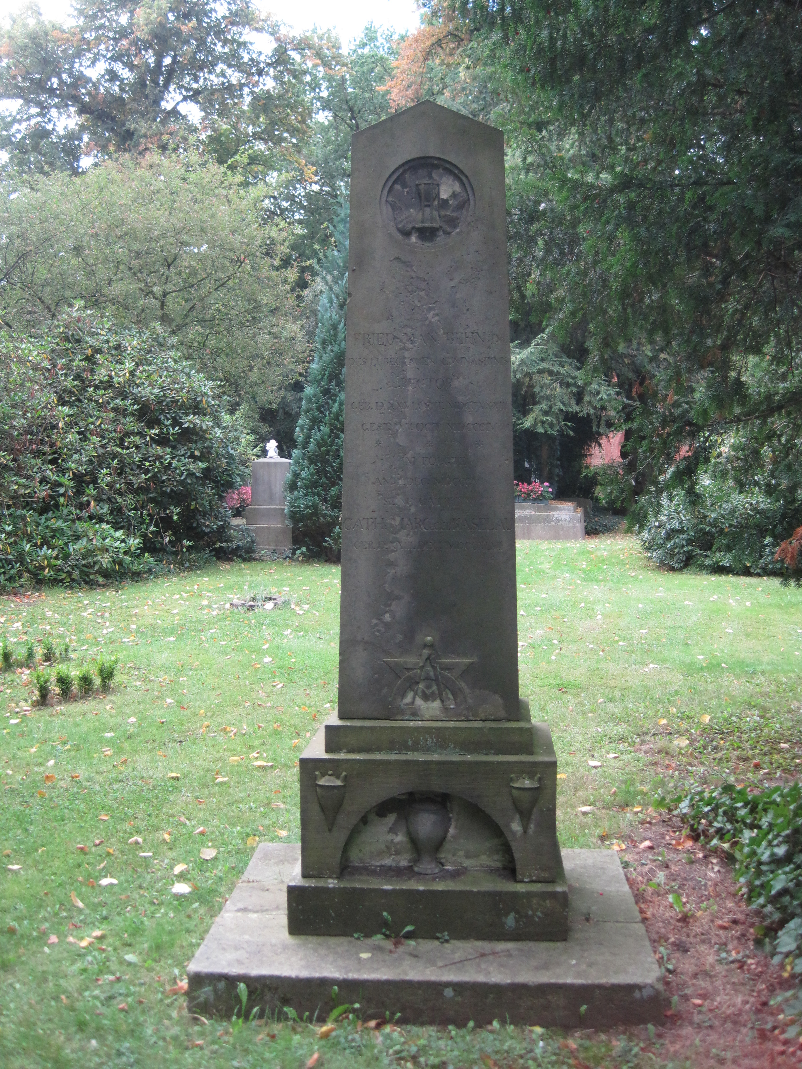 Grab auf dem St. Lorenz Friedhof in Lübeck